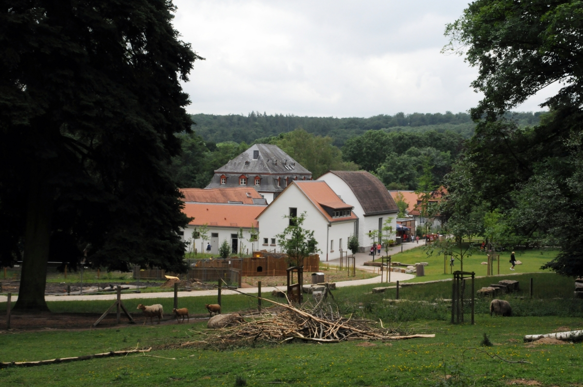 Tier- und Pflanzenpark Fasanerie, Wiesbaden, Hessen, Deutschland, wird von der Landeshauptstadt Wiesbaden betrieben und liegt außerhalb der Stadt im Nordwesten im Wiesbadener Stadtwald auf einem großzügig angelegten ca. 23 Hektar großen Areal. Das Gelände ist landschaftlich sehr vielseitig mit Anhöhen, Wiesen, einem hohen Waldanteil sowie Flussläufen und einem See. Die Gebäude eines Hofgut sowie das Jagdschloss stehen unter Denkmalschutz. In der Umgebung befindet sich die ehemalige Sommerfrische am Chausseehaus, der Kaiser-Wilhelm-Turm auf dem Schläferskopf und das ehemalige Kloster Klarenthal.